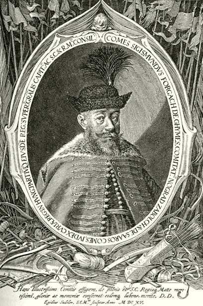 Forgách Zsigmond (1560 előtt–1621) felsőmagyarországi főkapitány, nádor portréja. Egidius Sadeler rézmetszete